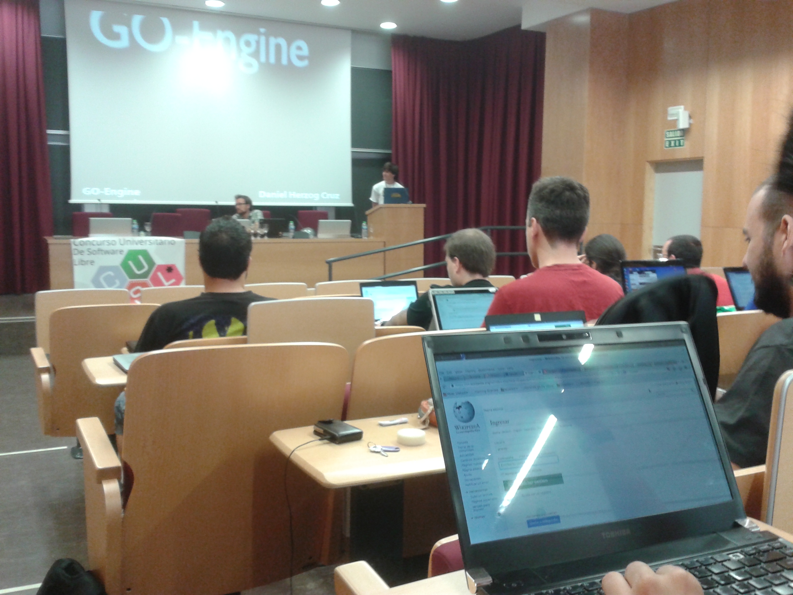 Editatón CUSL8